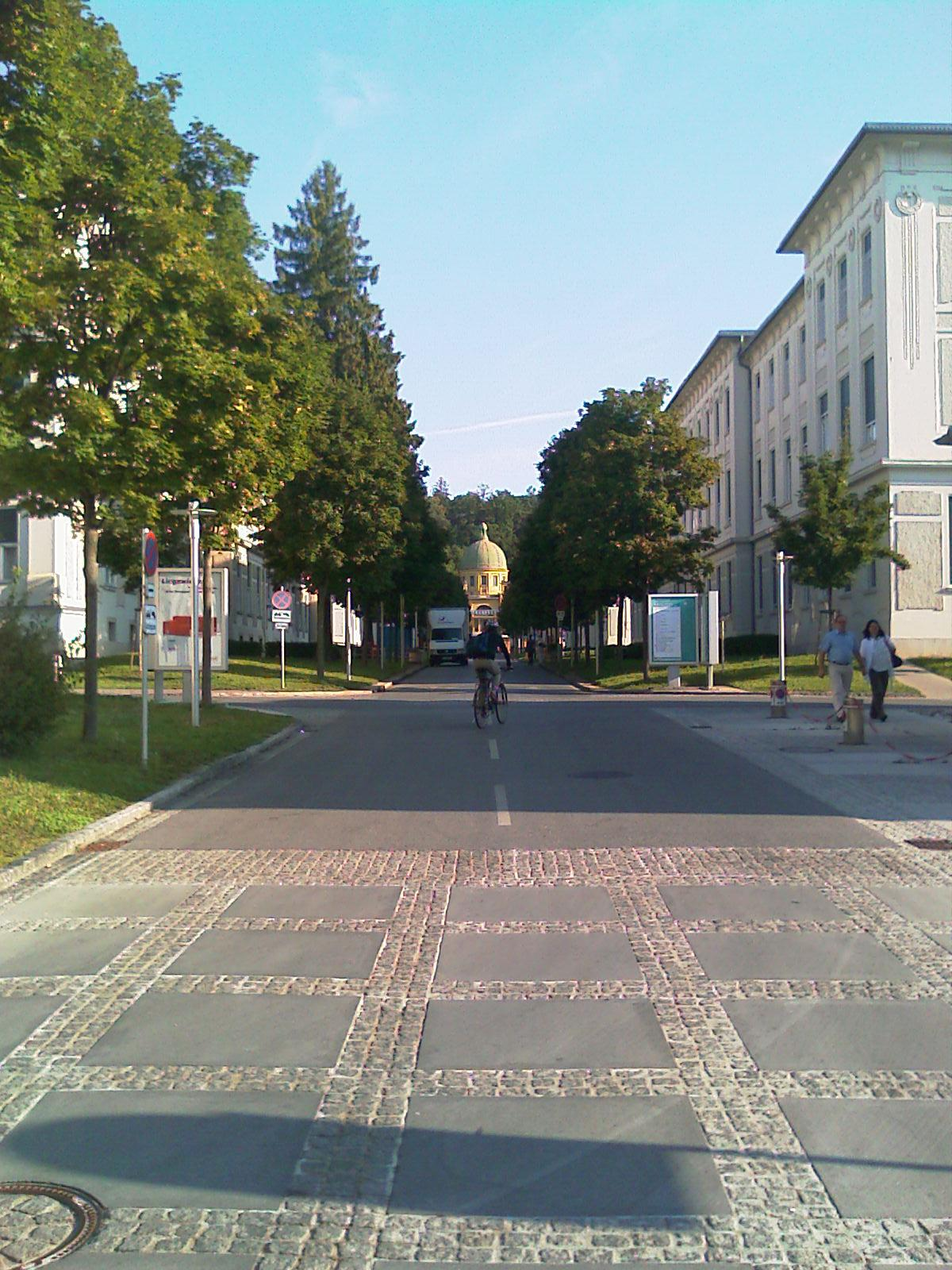 Die Hauptachse des LKH-Univ.-Klinikums-Graz